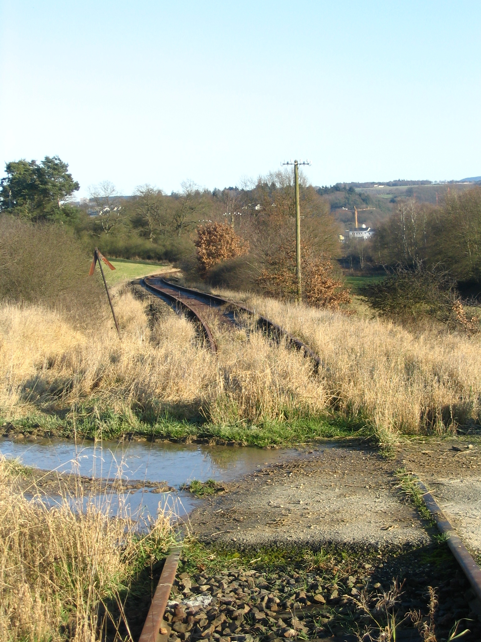 stillgelegte Hunsrückquerbahn bei Nannhausen